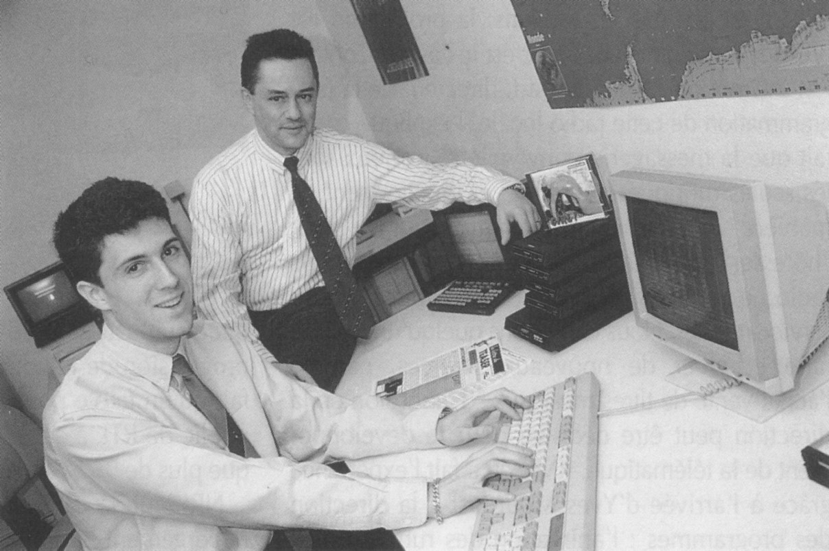 France-Teaser fut à l'origine, dans les années 1990, des premiers serveurs minitel (3614 Teaser - 3617 Email) permettant une connexion à l'Internet. En 1991, Teaser gérait quelques 4000 boites de messagerie électronique et proposait à ses utilisateurs des feeds de news envoyés par Satellite pour la réception et par modem terrestre pour l'émission. En 1995, France-Teaser fut le premier service d'abonnement Internet à passer sous la barre des 100 FF/mois avec son service "MouNet". Jean-Claude Michot à Gauche et Jean-René Vidaud à droite dans les locaux de France-Teaser à Ville d'Avray en Mars 1993